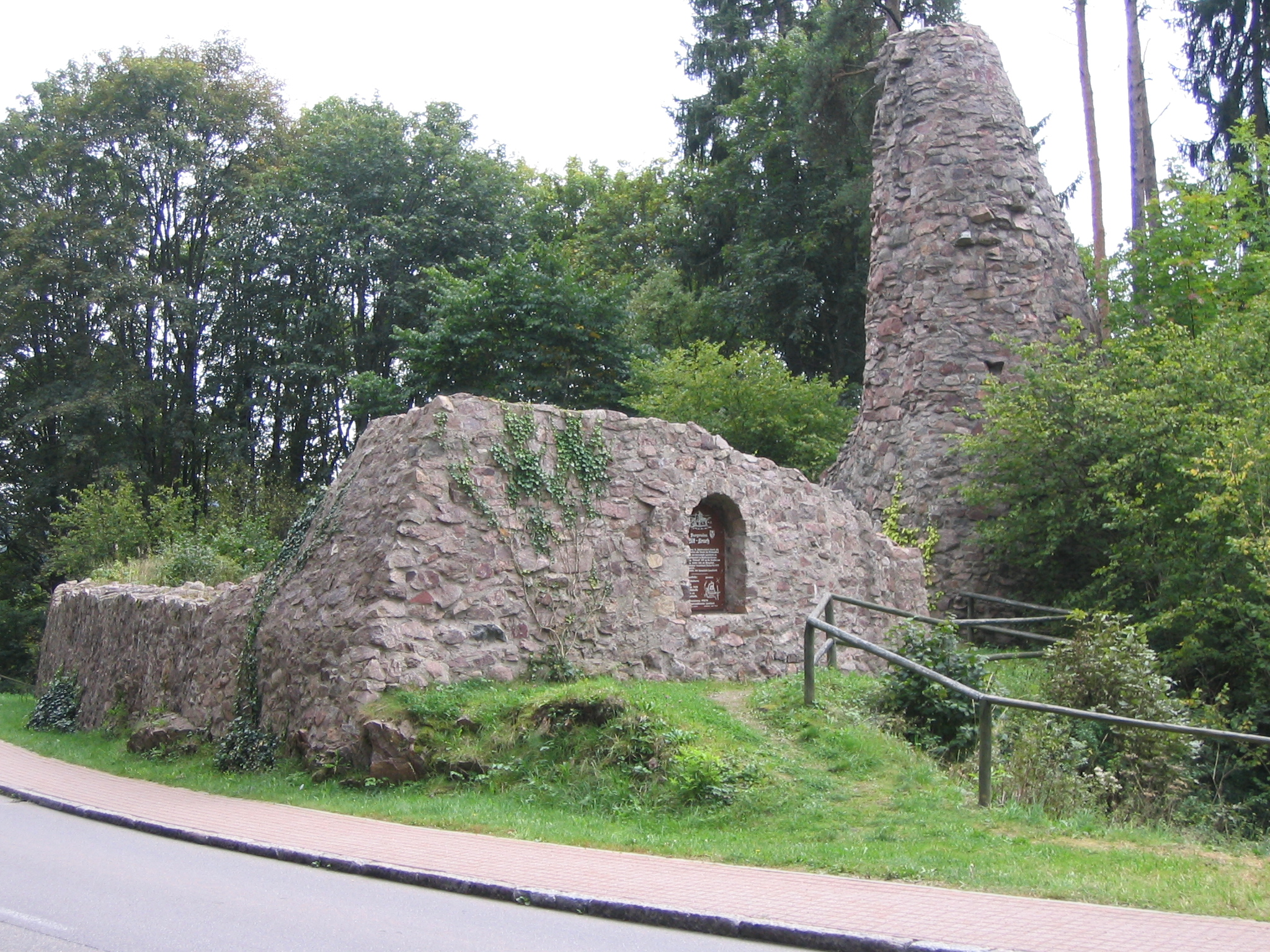 Ruine der Burg Alt-Urach in Lenzkirch